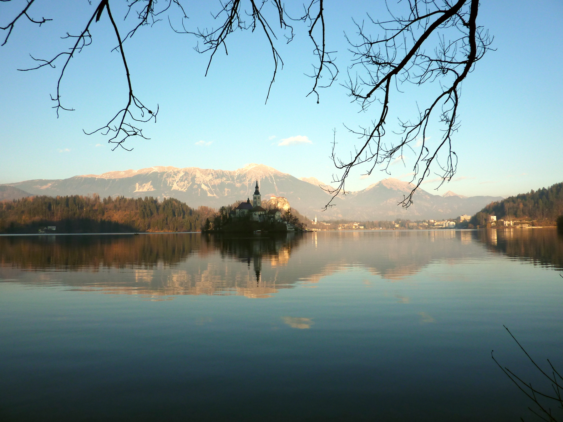 A view of the Bled lake, Slovenia